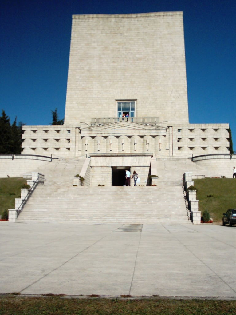 Sacrario del Montello